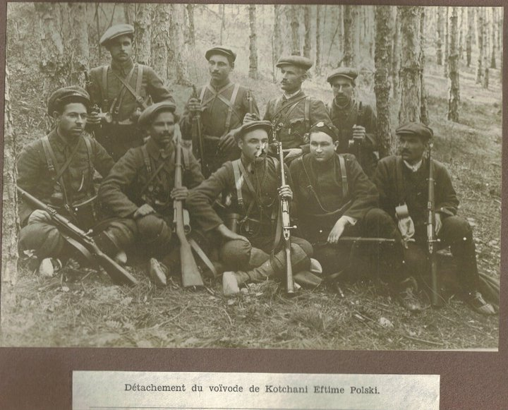 IMRO cheta ot Evtim Polski